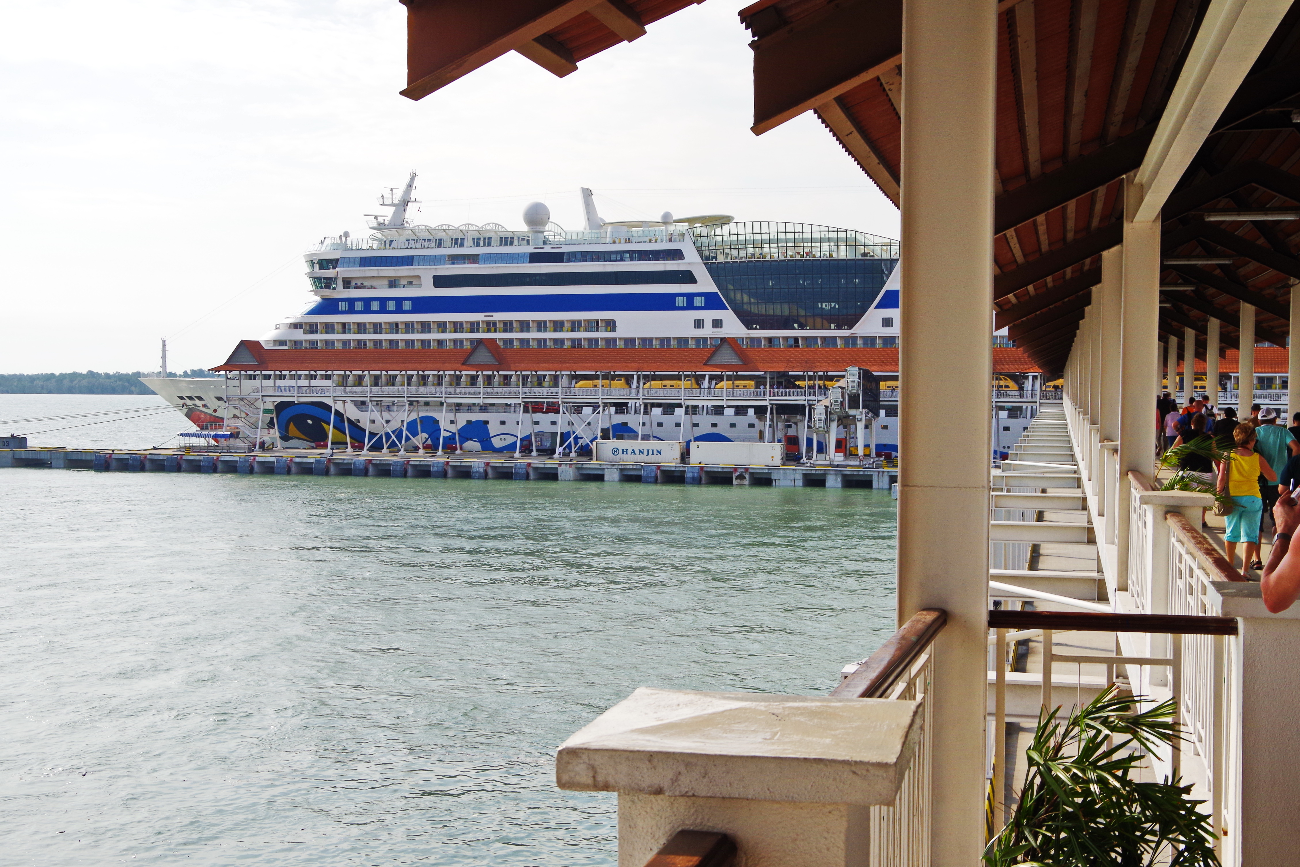 AIDAdiva am Kreuzfahrt-Terminal, Port Klang